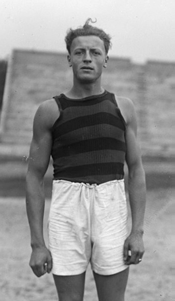 Henri Dozolme : [photographie de presse] / [Agence Rol]